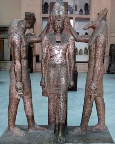 Horus et Seth effectuant le couronnement de Ramses III, Musée égyptien du Caire. Groupe statuaire de la XXe dynastie.